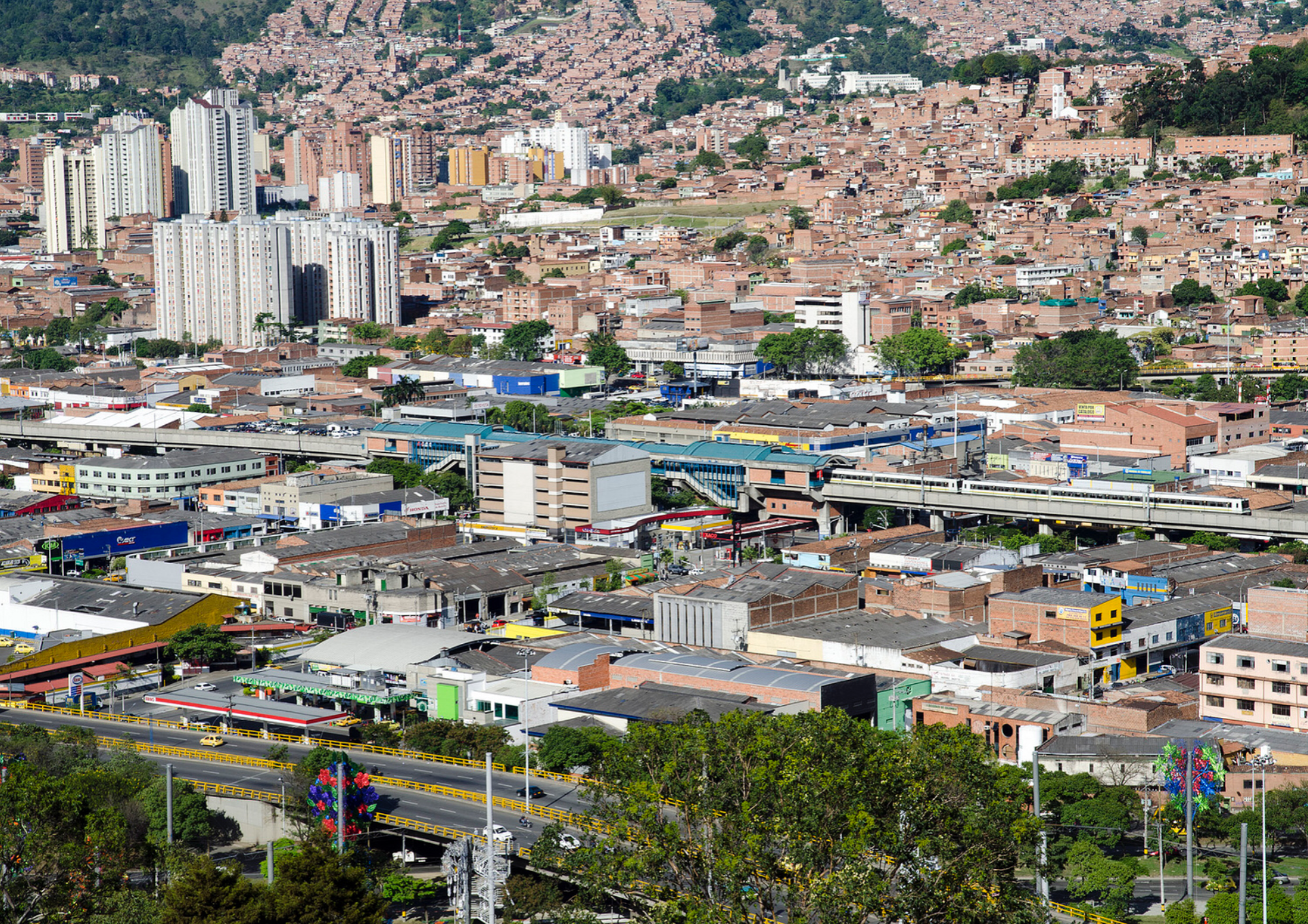 Estación Exposiciones (Metro de Medellín)